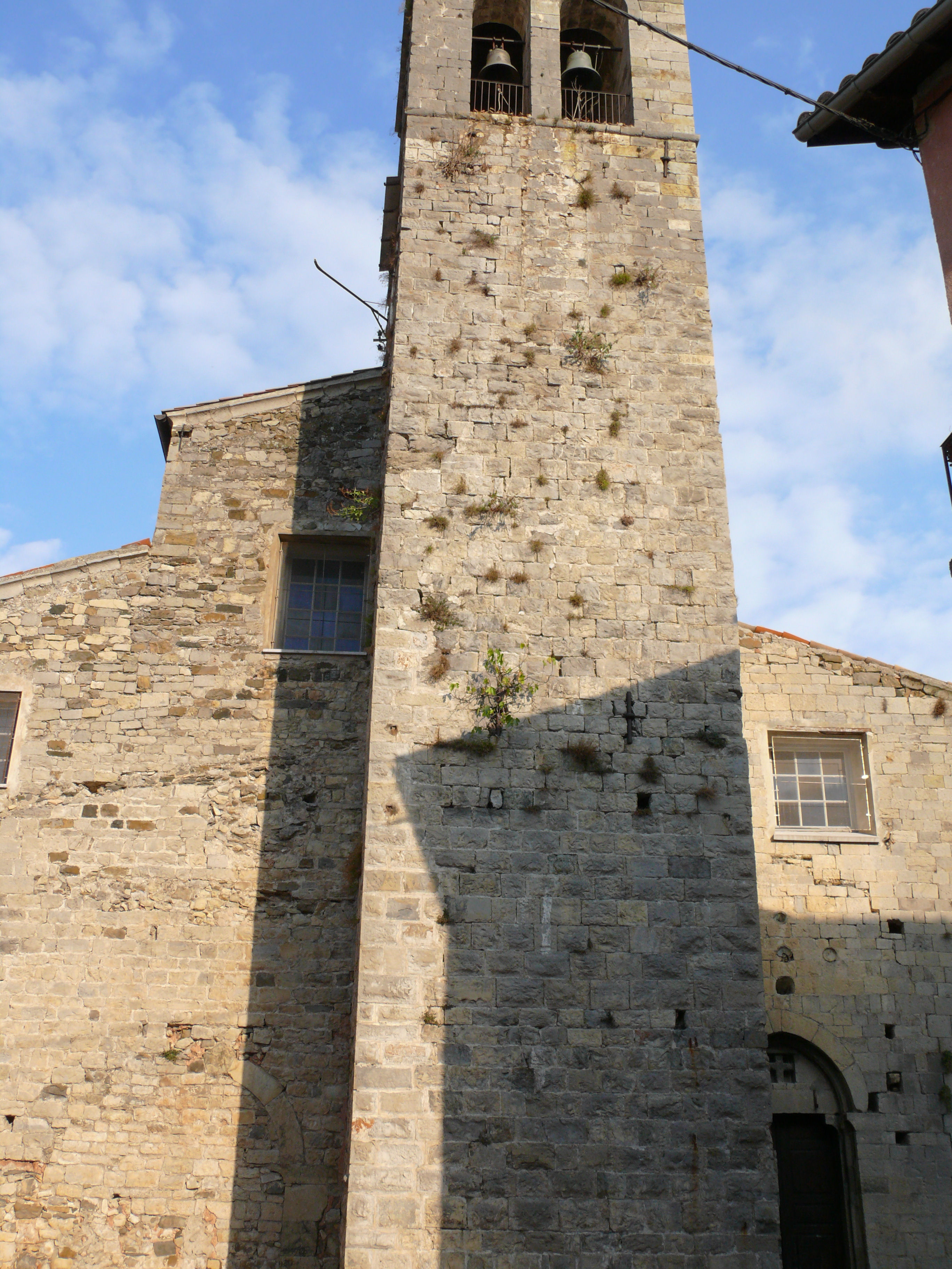 Utelle - Église Saint-Véran - La façade ouest et le clocher